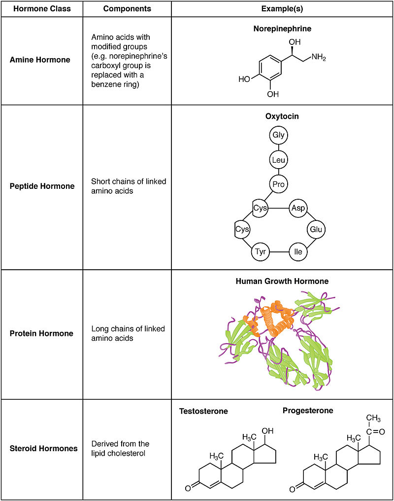 hormone